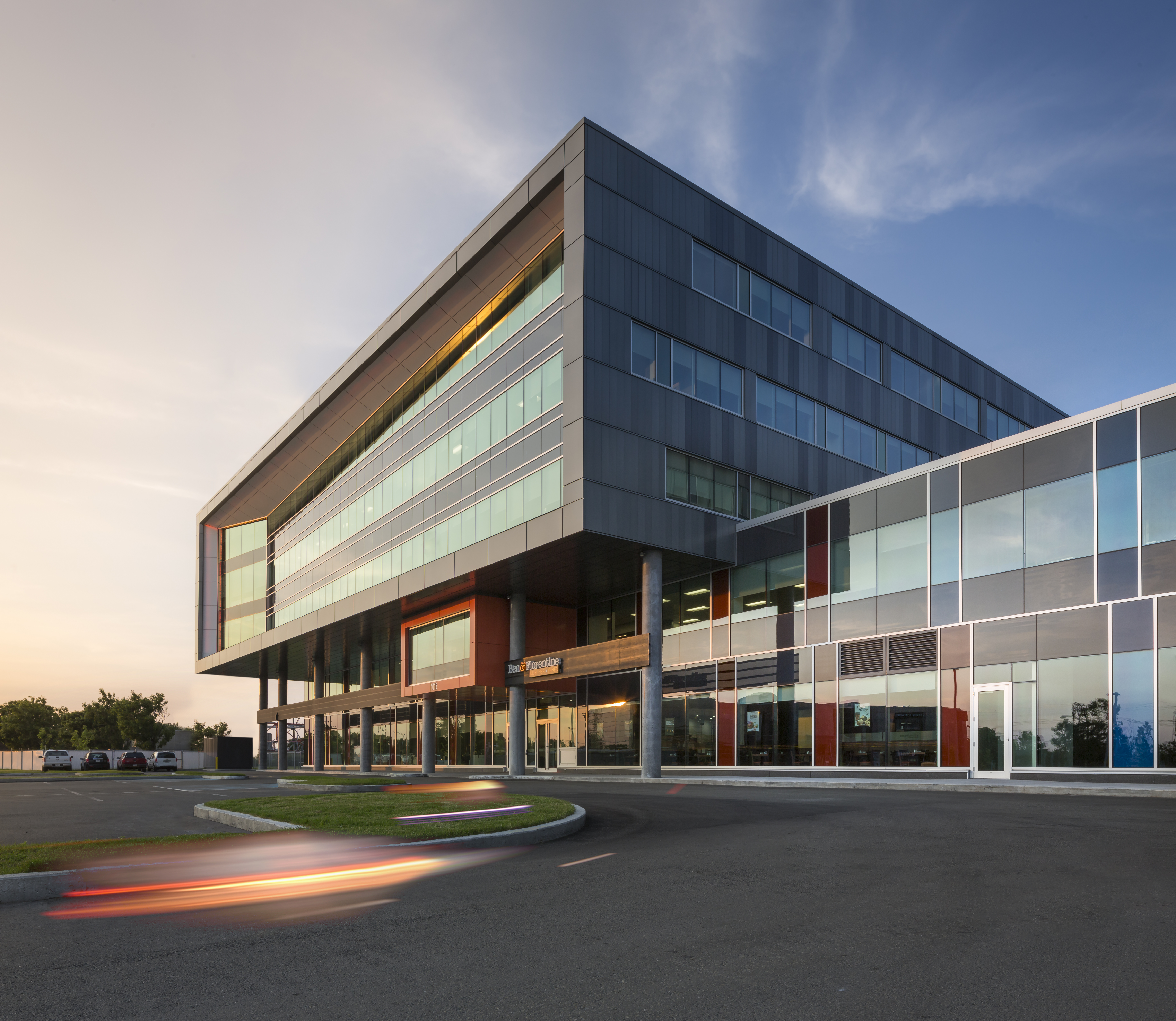 Siège social de Norda Stelo